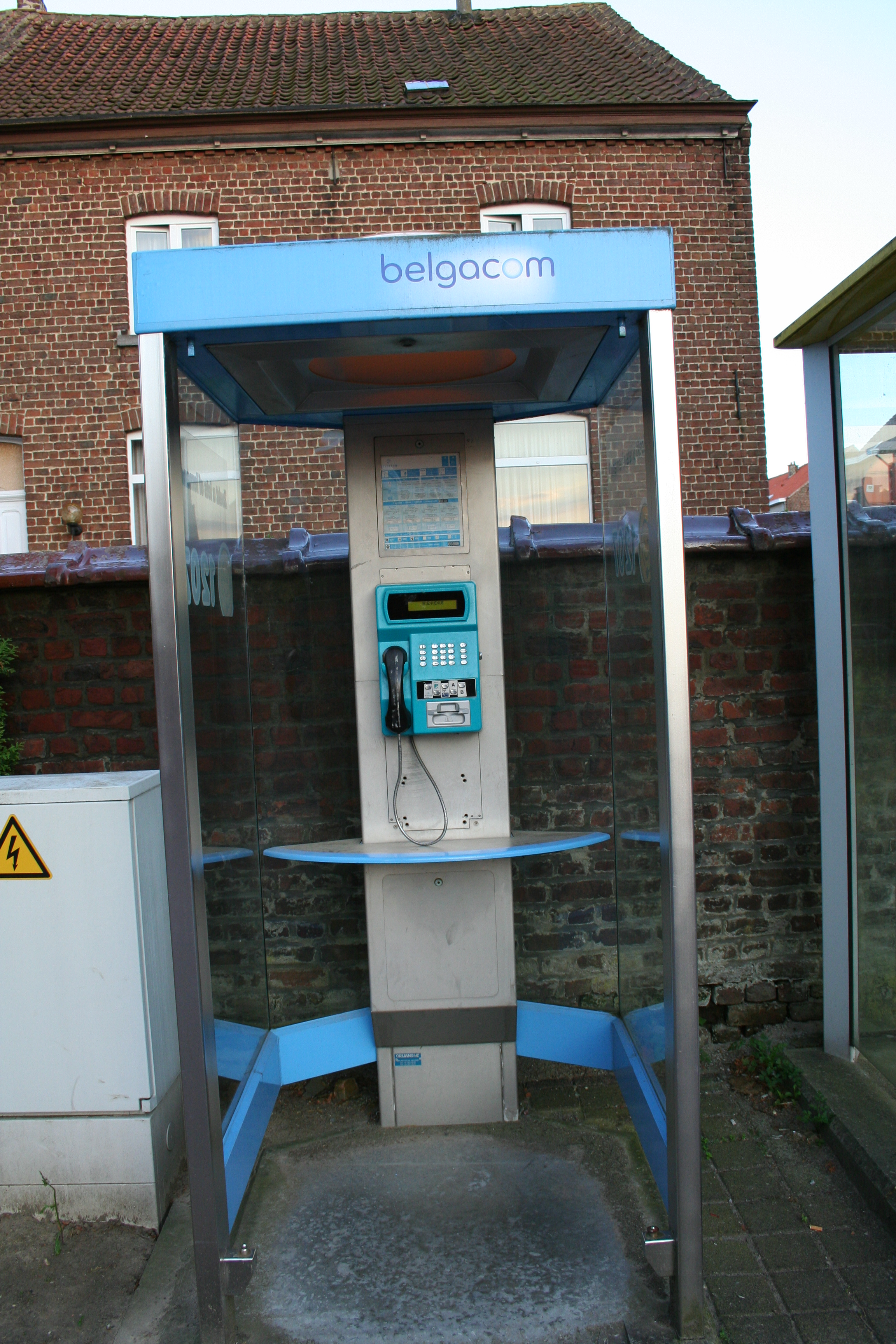 Cabine téléphonique de Belgacom